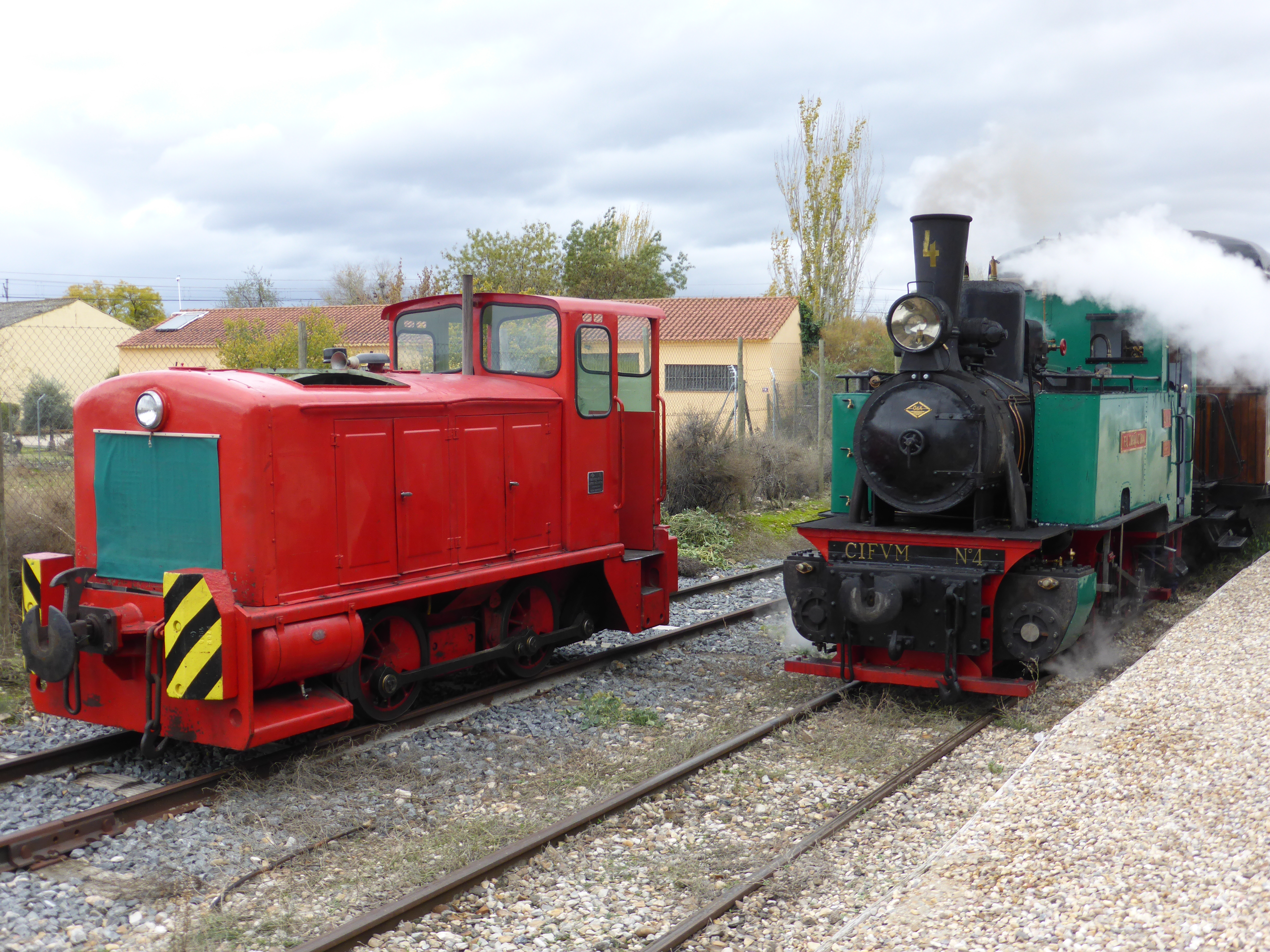 Una locomotora de vapor y una locomotora diésel, prestando servicio en el Tren de Arganda, en el apeadero de la Laguna del Campillo (municipio de Rivas-Vaciamadrid). Ambas máquinas fueron fabricadas en Alemania, por Orenstein & Koppel ("O&K"). La locomotora de la derecha es la "ÁLIVA", de vapor-carbón, año 1926, número 4 del CIFVM. Su número de construcción es el 11198, que está grabado en numerosas piezas. En cambio, la locomotora pintada de rojo es una diésel fabricada en el año 1956; cuya placa lateral dice: "ORENSTEIN-KOPPEL und LÜBECKER MASCHINENBAU Aktiengesellschaft WERK DORSTFELD". Dentro de la cabina otra placa informa que su número de fábrica fue el 25632. Y su año: 1956 (Baujahr: 1956). Y que sus velocidades van de 0 a 20 kilómetros/h. Esta diésel fue fabricada en Dortmund-Dorstfeld.